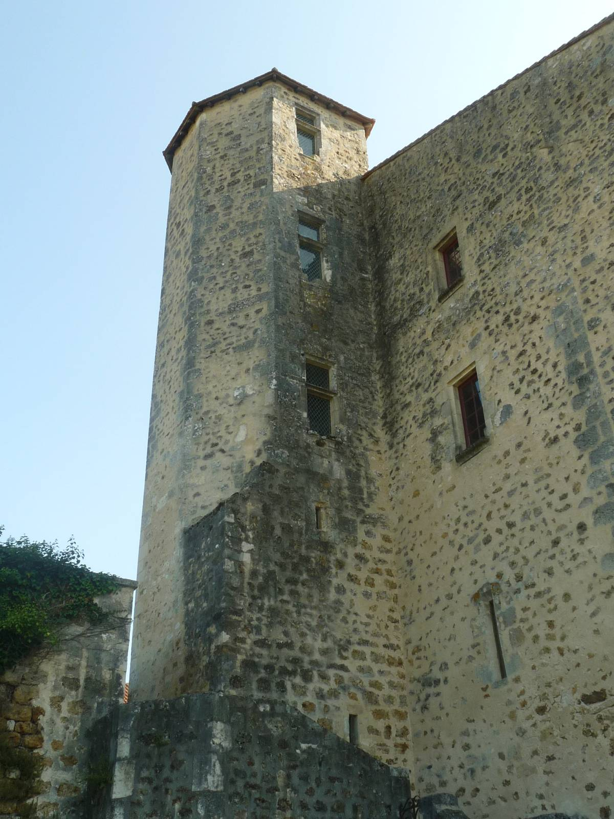 château de Montbron (16), France